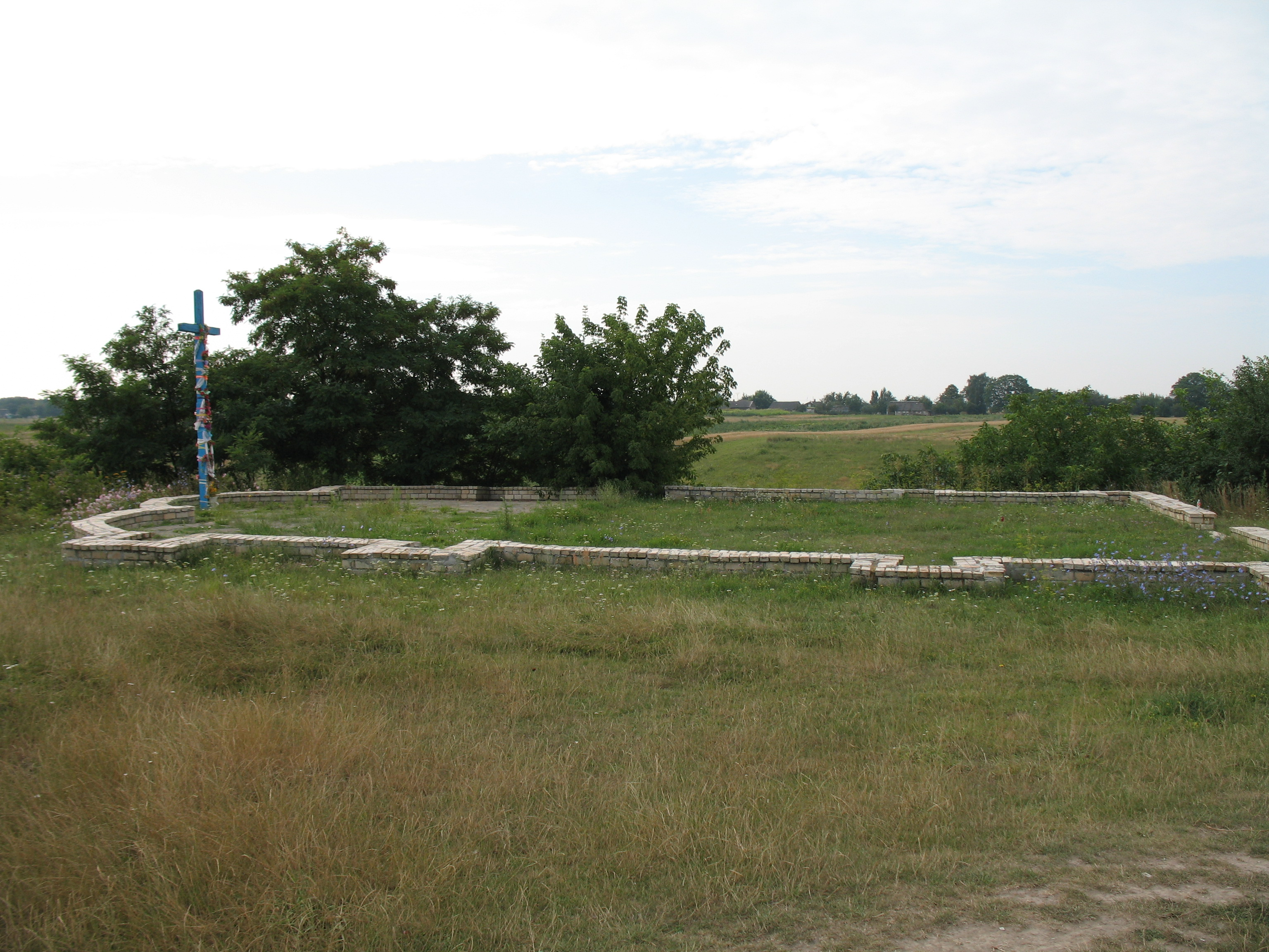 Володимир Волинський район. Село Федорівка. Стара катедра. Вид з півночі